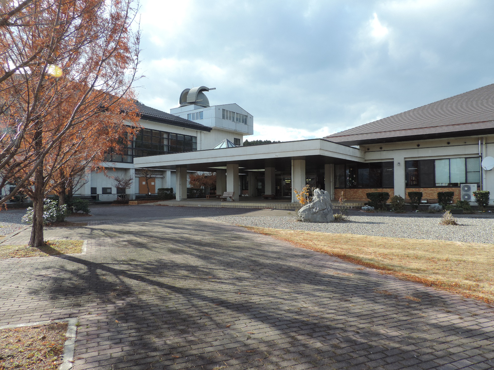 彦根市子どもセンター（滋賀県彦根市：2017年撮影）